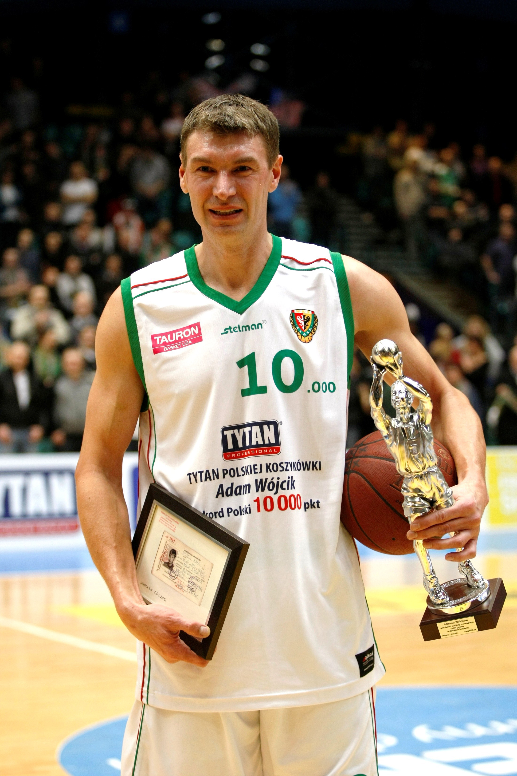 WKS Śląsk Wrocław vs PBG Basket Poznań, Tauron LigaAdam Wójcik przekroczył w meczu granicę 10.000 punktów w karierze; nie dokonał tego jeszcze żaden polski koszykarz